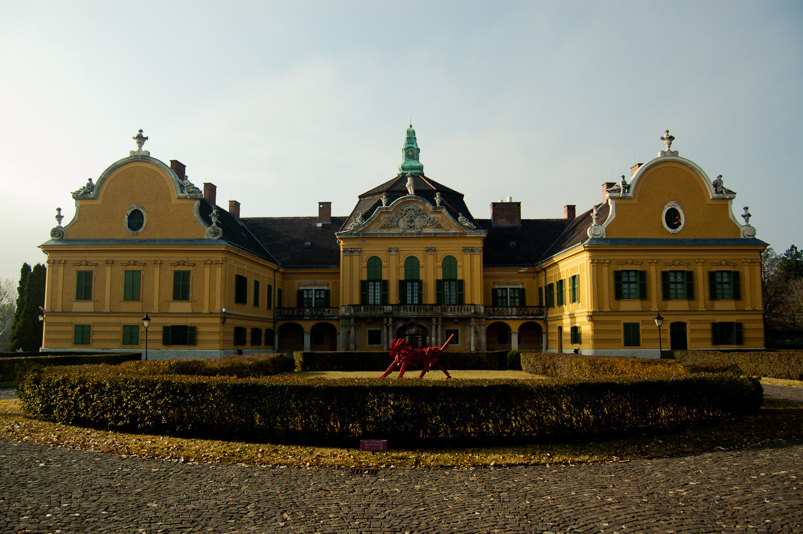 volt Rudnyánszky-kastély (Budapest 22, Kastélymúzeum utca 2.) This is a photo of a monument in Hungary. Identifier: 1296